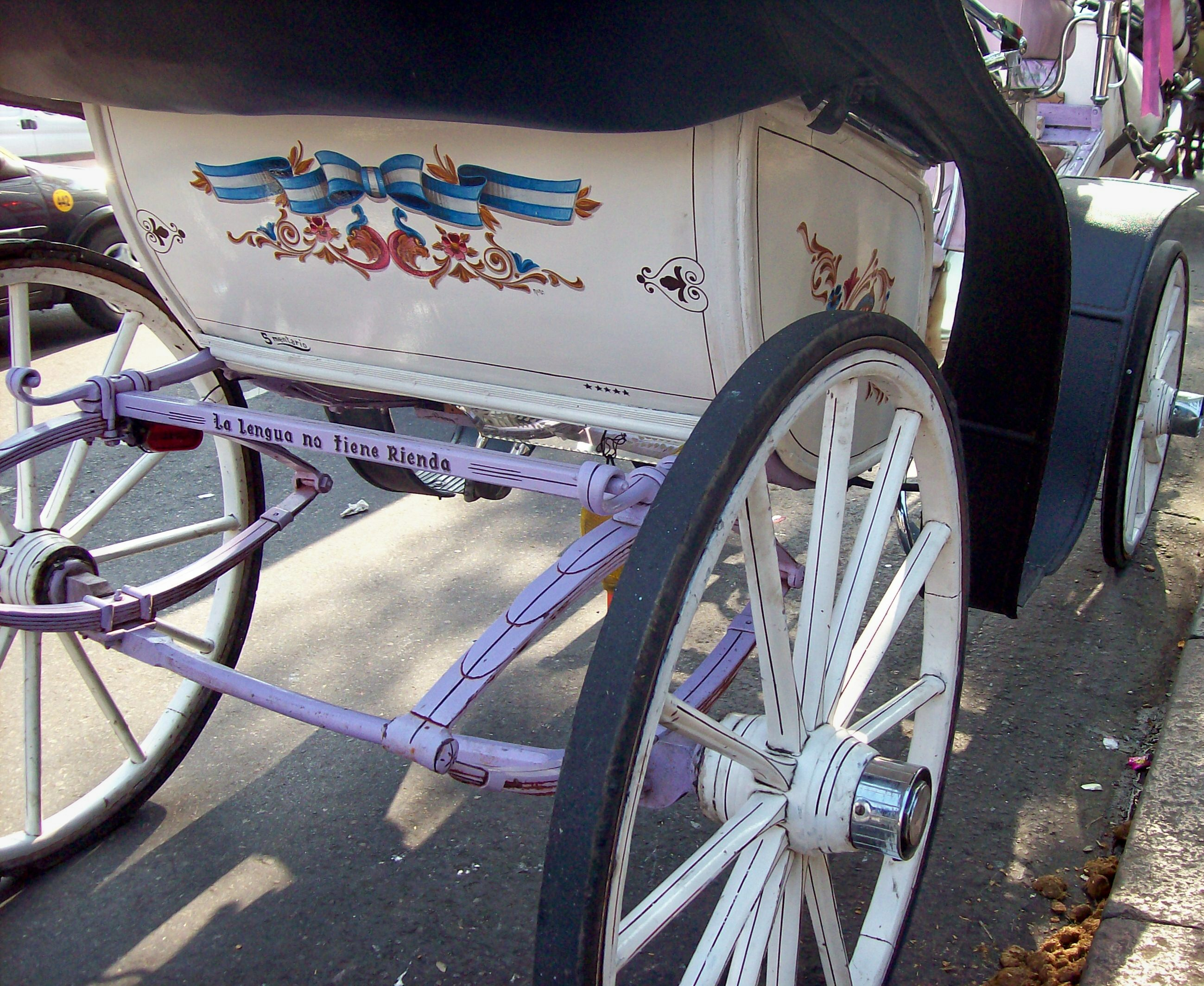 "Mateo" con Fileteado porteño, cerca del zoológico de la ciudad de Buenos Aires, ciudad.